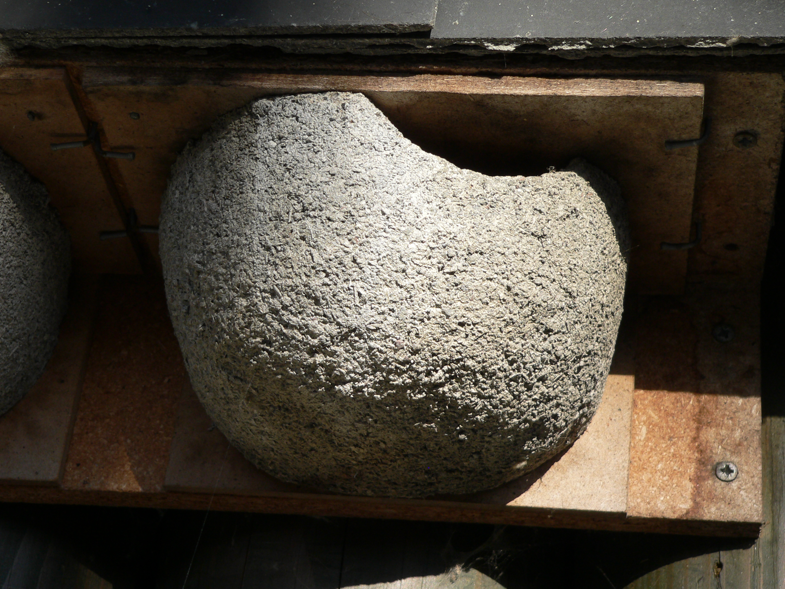 artificial nest for Delichon urbica